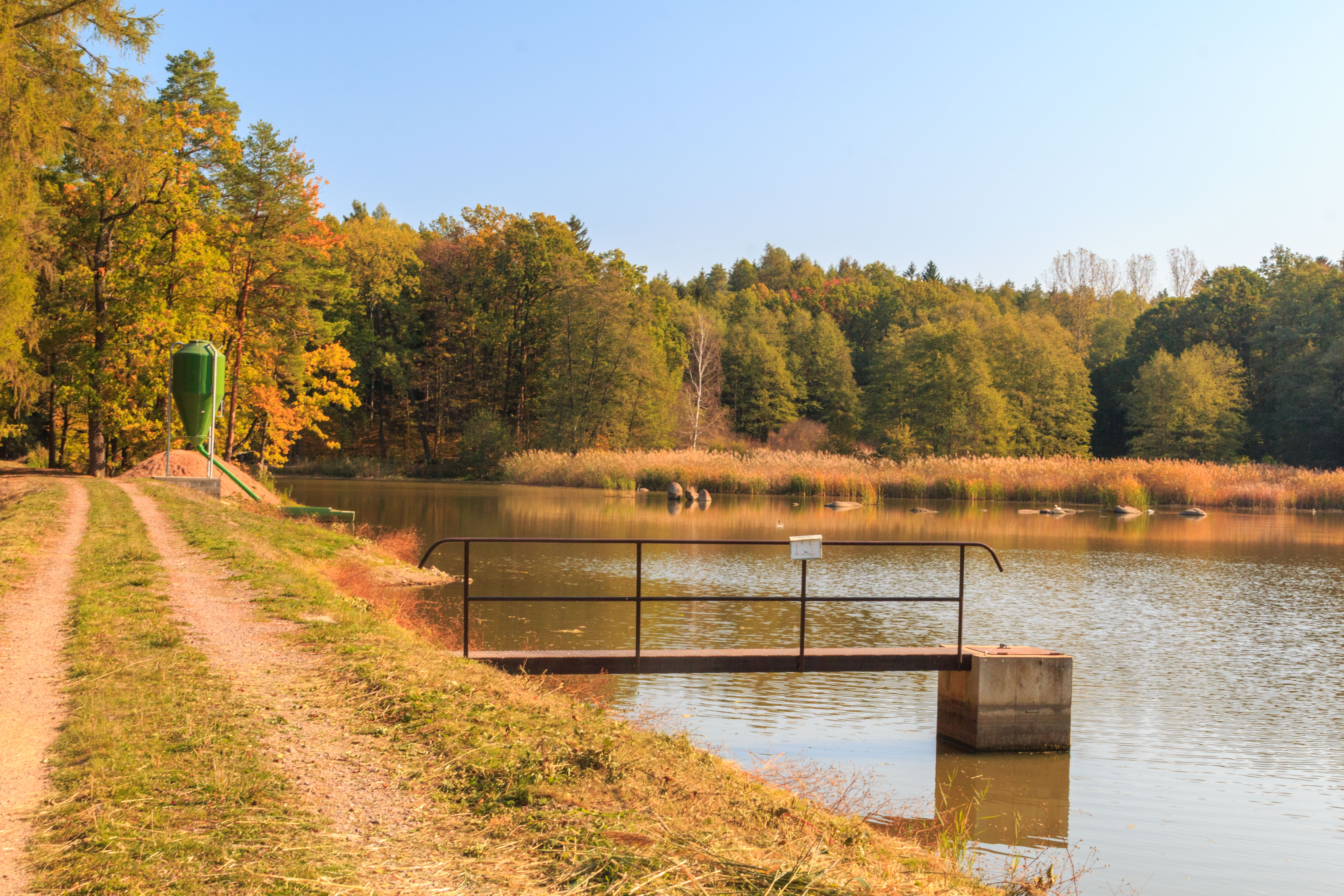 Rybník Velká Straka u Studené Vody Project: Vodstvo. Ticket: 1617.